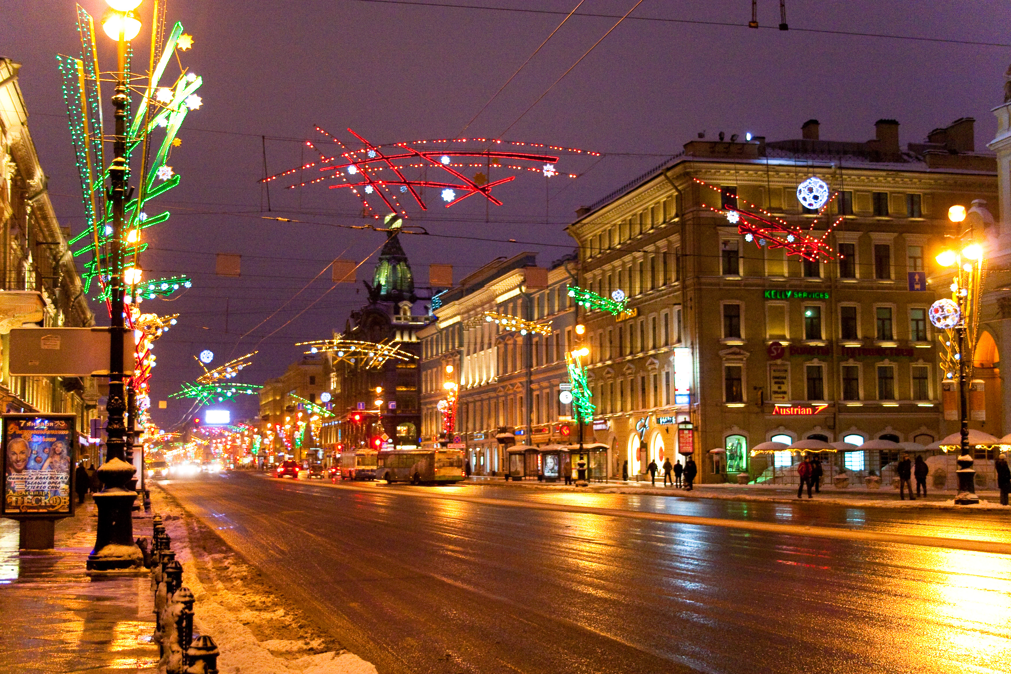 Nevsky street